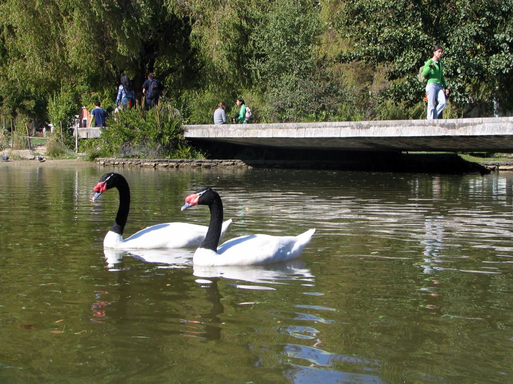 Laguna de los Patos, Universidad de Concepción, Concepcion, Chile